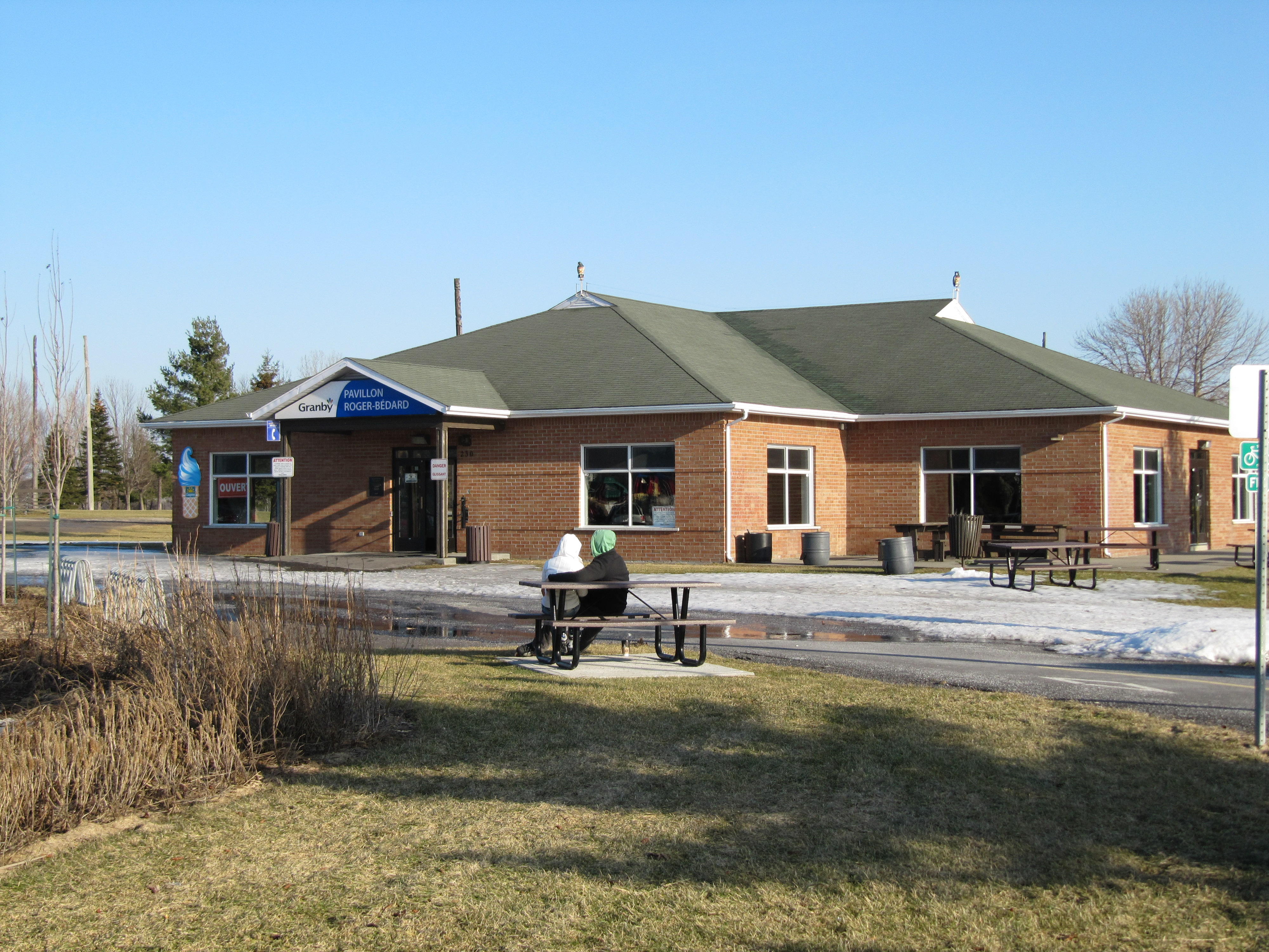 Pavillon Roger-Bédard à Granby (Québec) près du lac Boivin